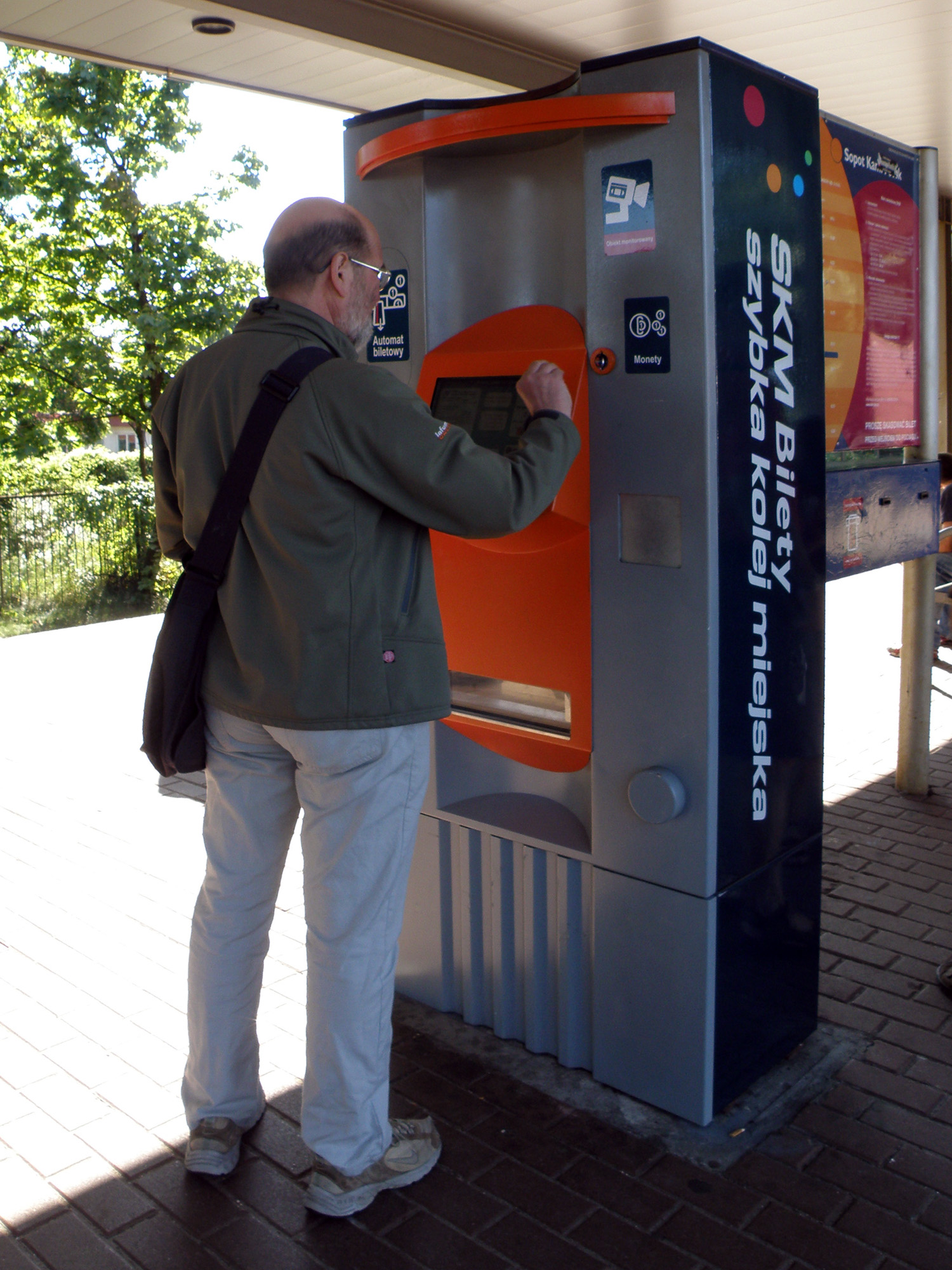 Sopot Kamienny Potok, SKM, Automat do sprzedaży biletów